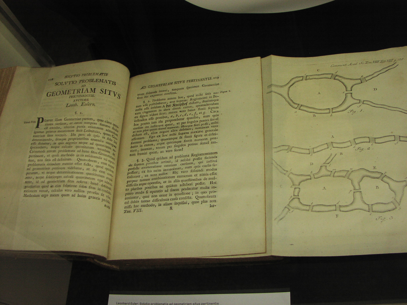 Leonhard Euler publikációja a königsbergi hidakról az Eidgenössische Technische Hochschule könyvtárában